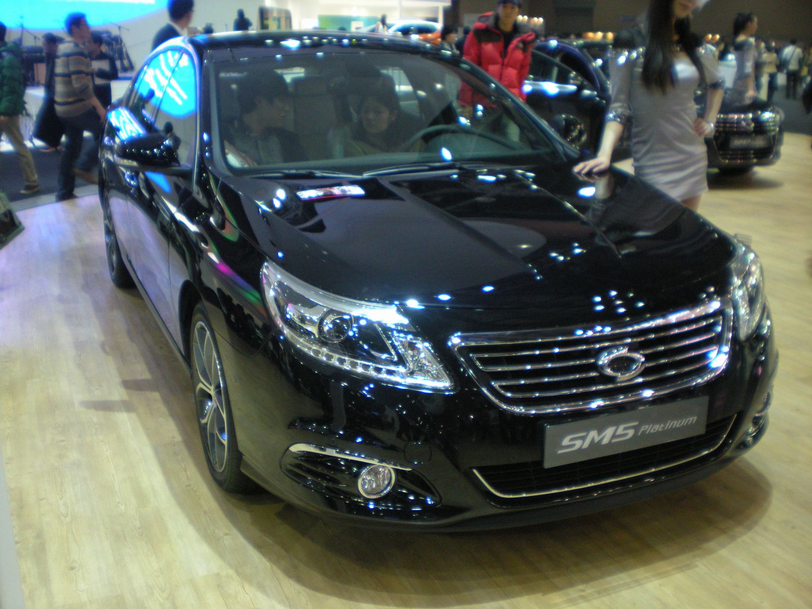 ルノーサムスン・SM5